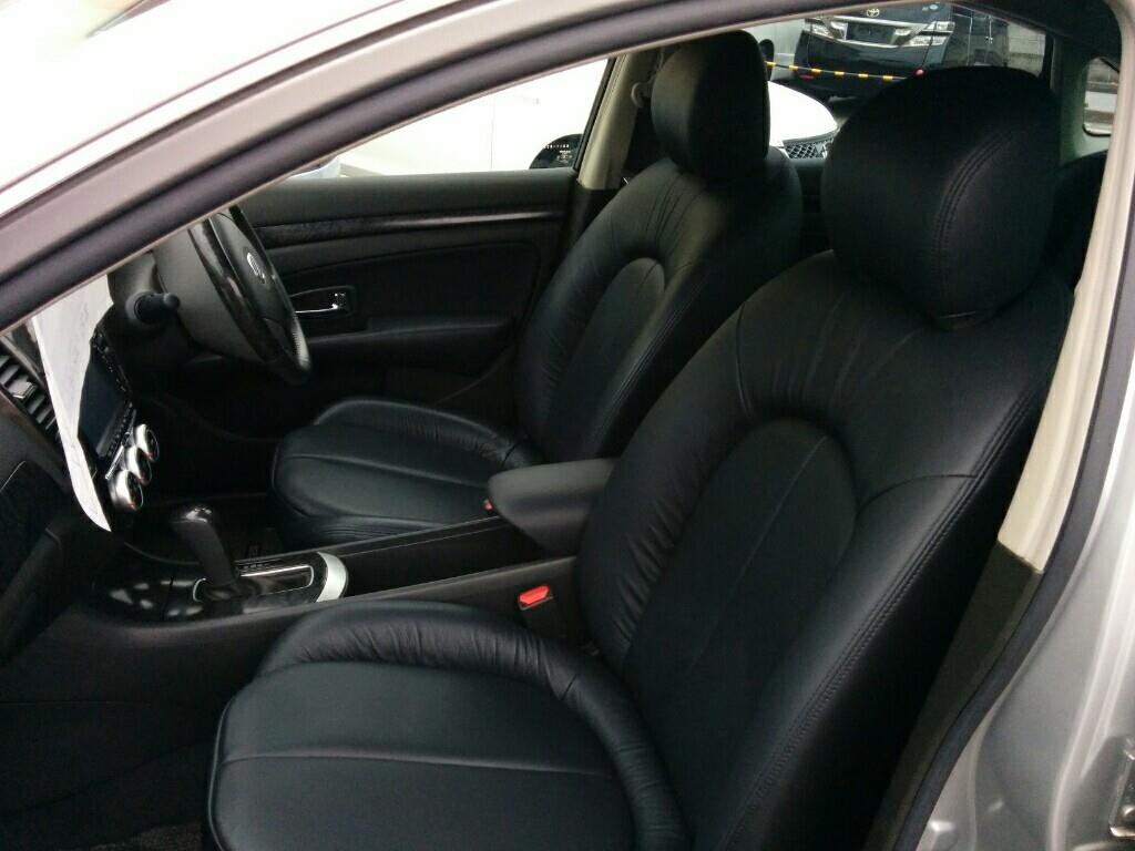 日産・シルフィ